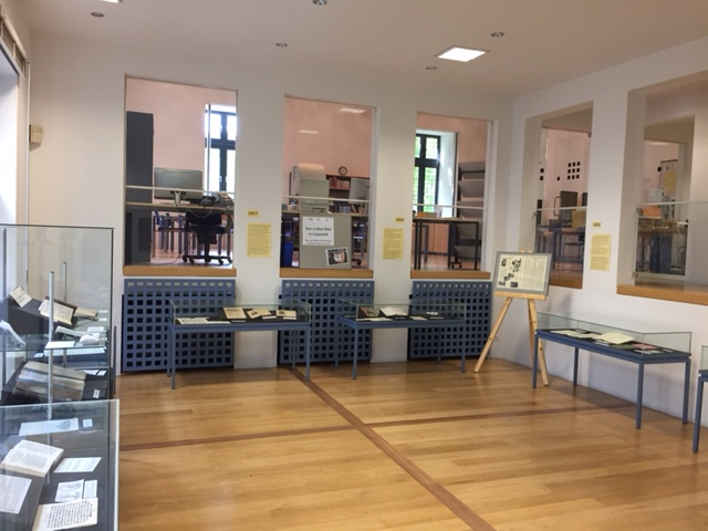 Der Eingangsbereich mit Ausstellung.